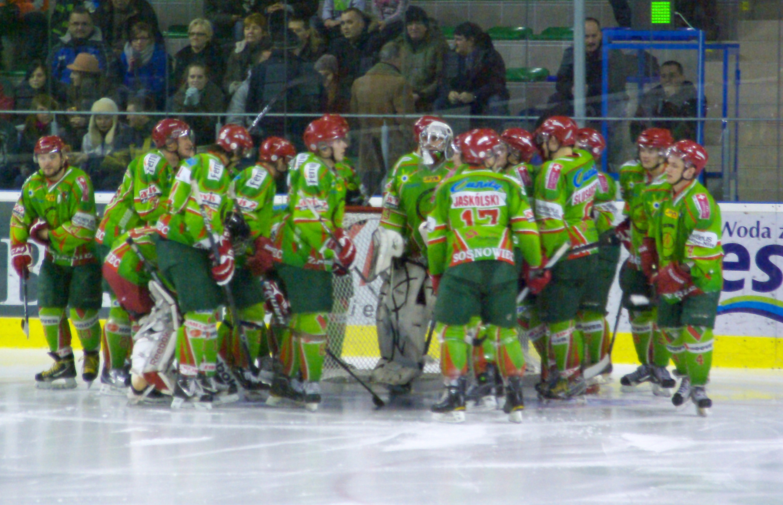 Zawodnicy Zagłębia Sosnowiec w meczu z Ciarko PBS Bank Sanok, Arena Sanok 10 lutego 2012